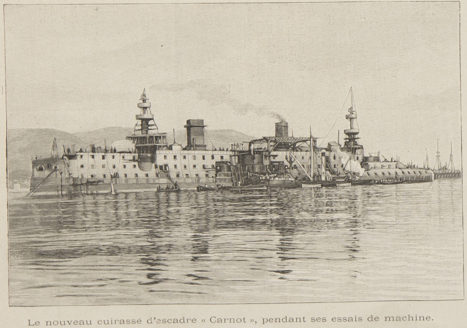 The French battleship Carnot Original caption: "Le nouveau cuirassé d'escadre « Carnot », pendant ses essais de machine."